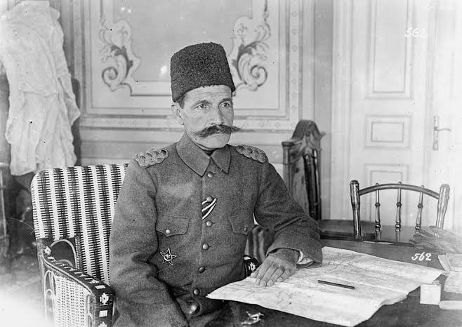 Generalul turc Mustafa Hilmi Paşa, comandantul Corpului VI Armată turc, comandantul forţelor otomane din România, din Primul Război Mondial